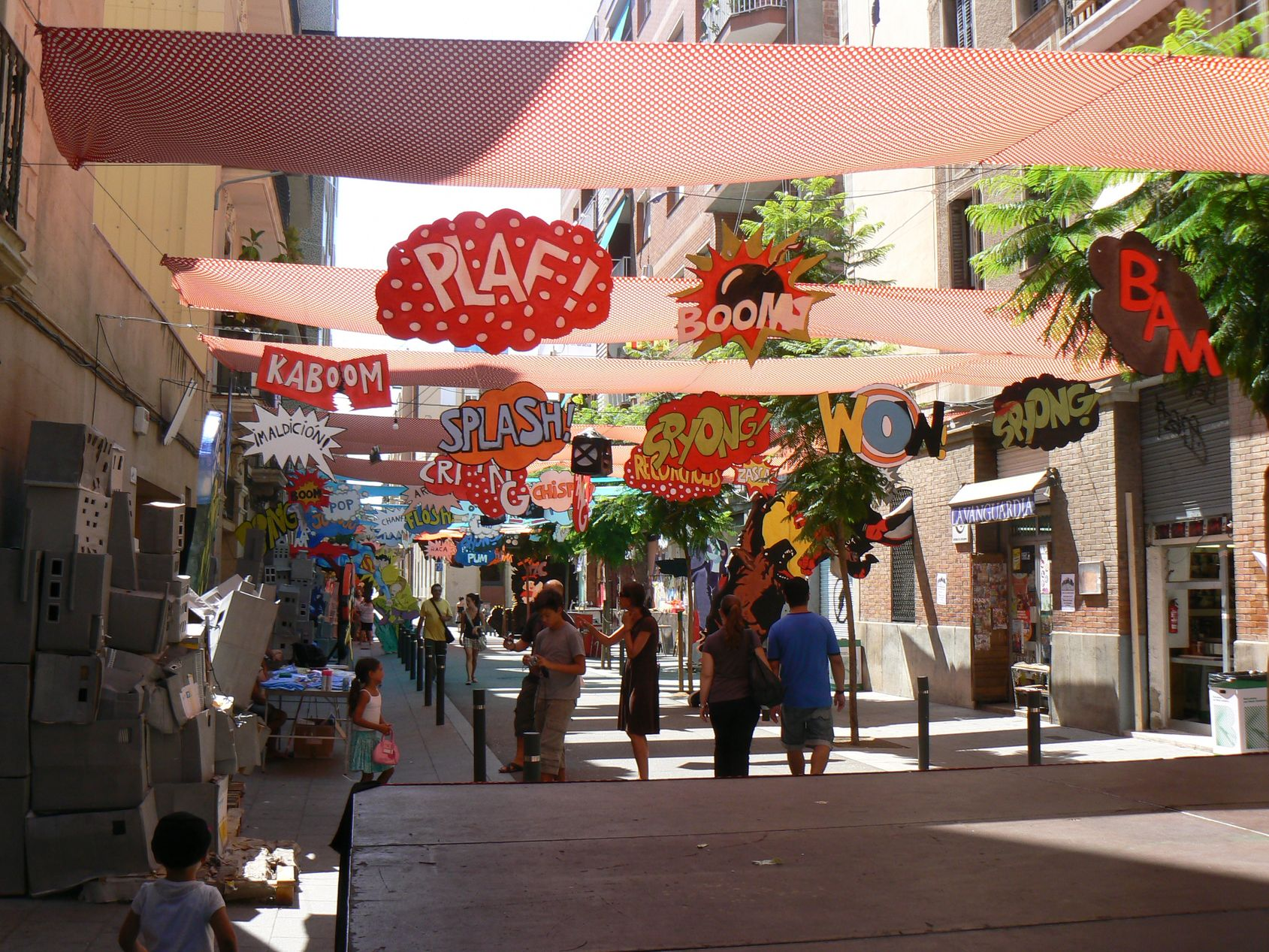 Interior del carrer Bruniquer decorat per les festes de Gràcia de 2010, en un moment de desans. En primer terme s'aprecia una tarima que serveix d'escenari on actuen els grups musicals. A l'esquerra hi ha una paradeta on es venen samarretes de les festes de Gràcia i al fons a l'esquerra una barra de bar a l'exterior. Les activitats estan organitzades pels veins de Gràcia, i els decorats dels carrers i places estan creats i fets per ells mateixos.